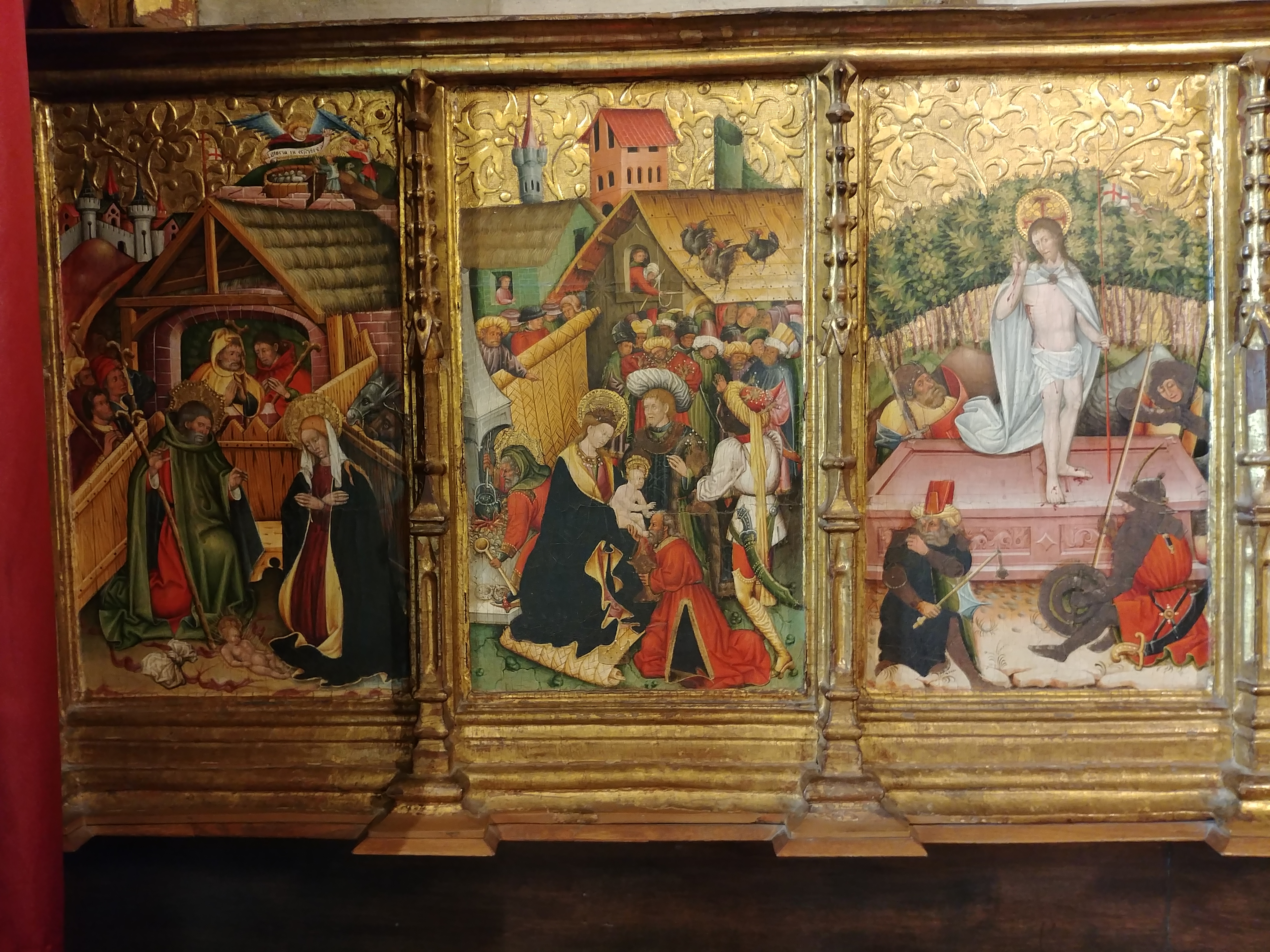 Taules de la 1 a la 3